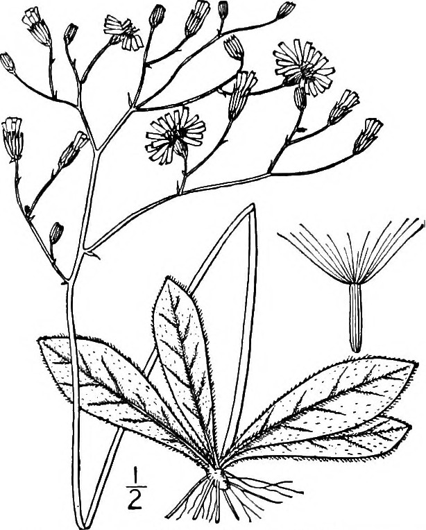 Hieracium praealtum